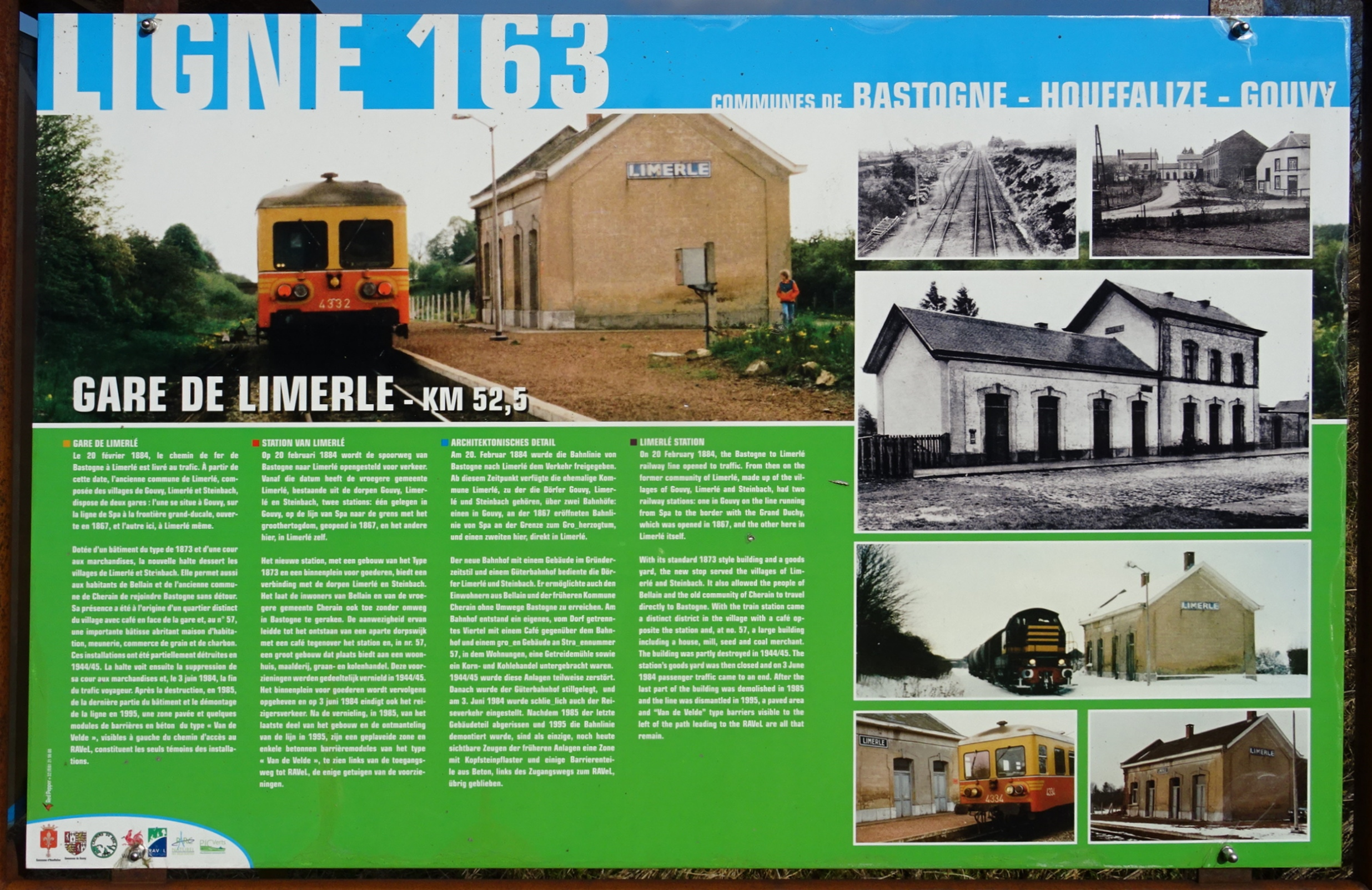 Informatiebord bij voormalig station Limerlé aan de opgeheven spoorlijn 163. Het station ligt bij km 52.5. Het spoor is opgebroken en omgezet naar een RAVeL. Het bord toont de geschiedenis van het station en een aantal historische foto's.